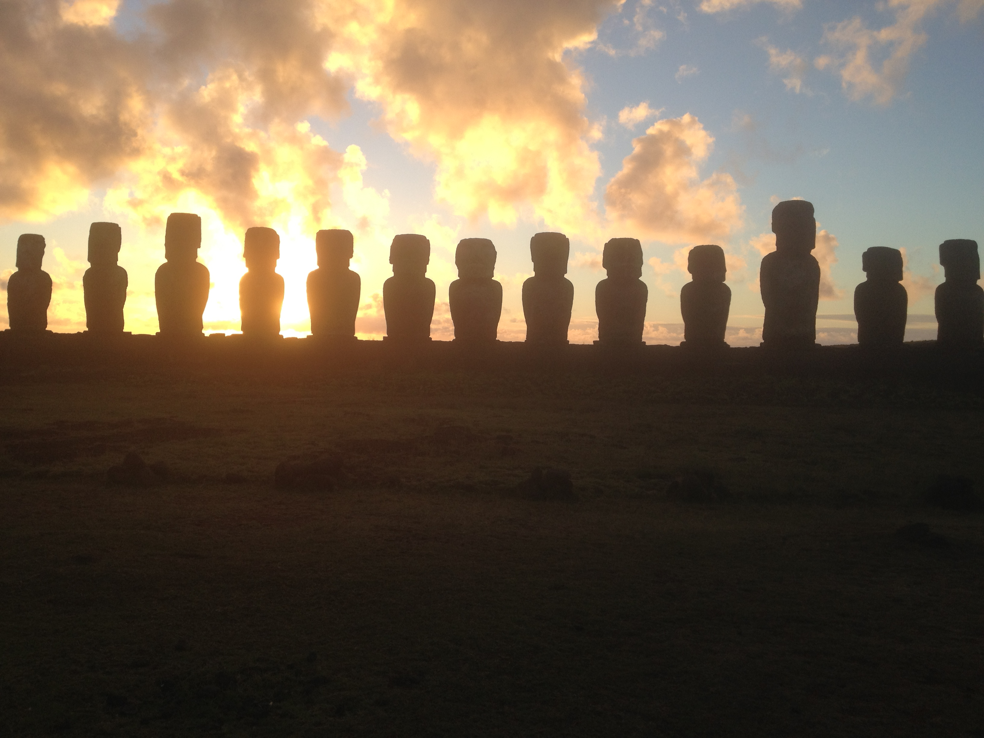 זריחה בטונגריקי